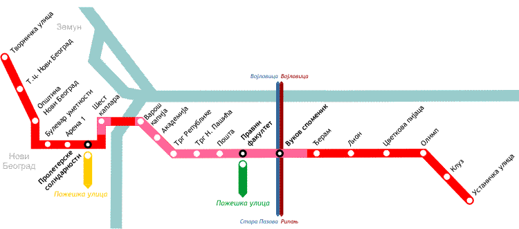 Централна линија Београдског лаког метроа. надземни део трасе Централне линије подземни део трасе Централне линије Врачарска линија Савска линија Плава линија Беовоза Црвена линија Беовоза